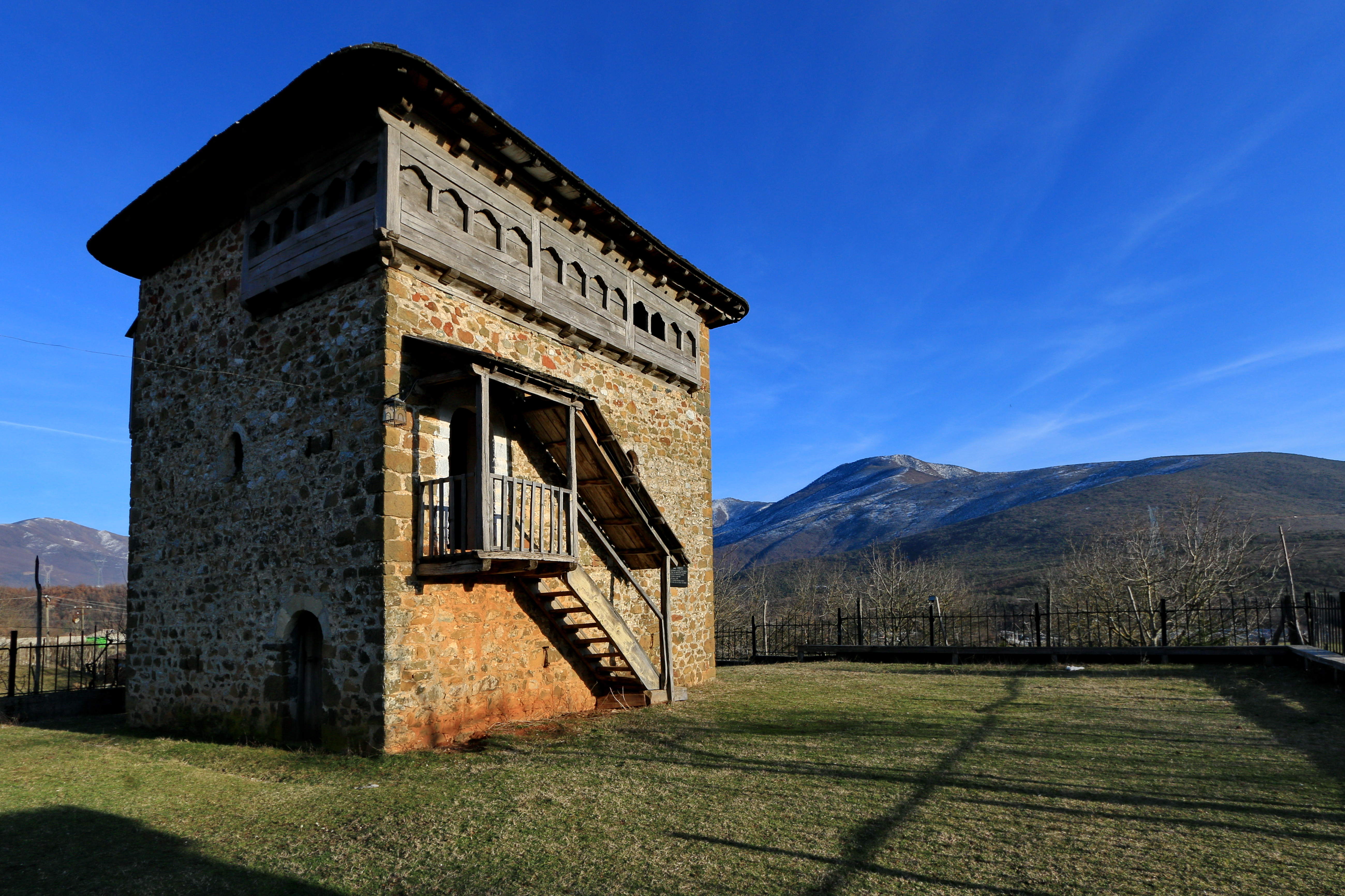 Kulla e Patriotit Mic Sokoli